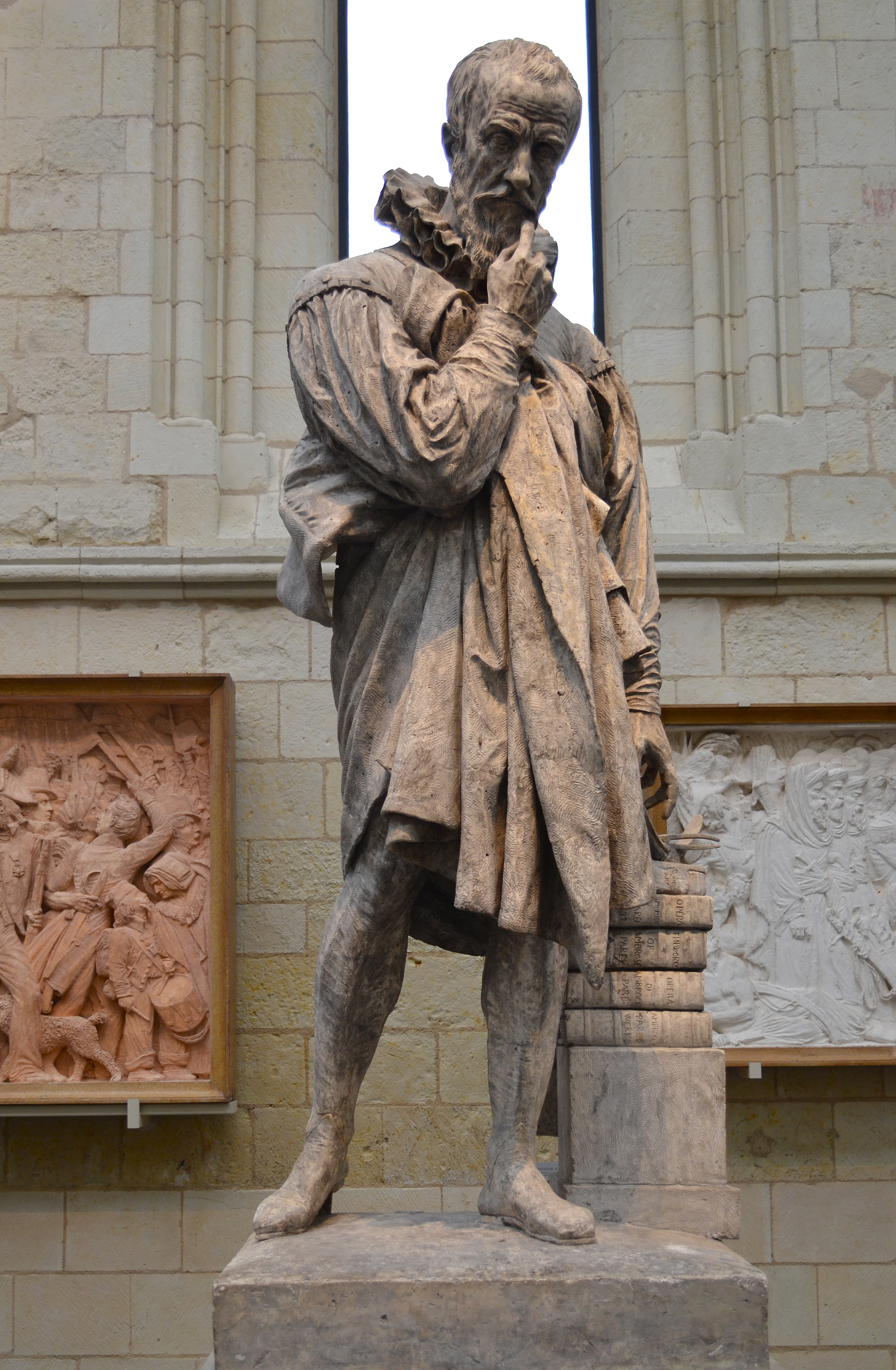 Ambroise Paré par David d'Angers, plâtre, musée David d'Angers, Angers (Maine-et-Loire)